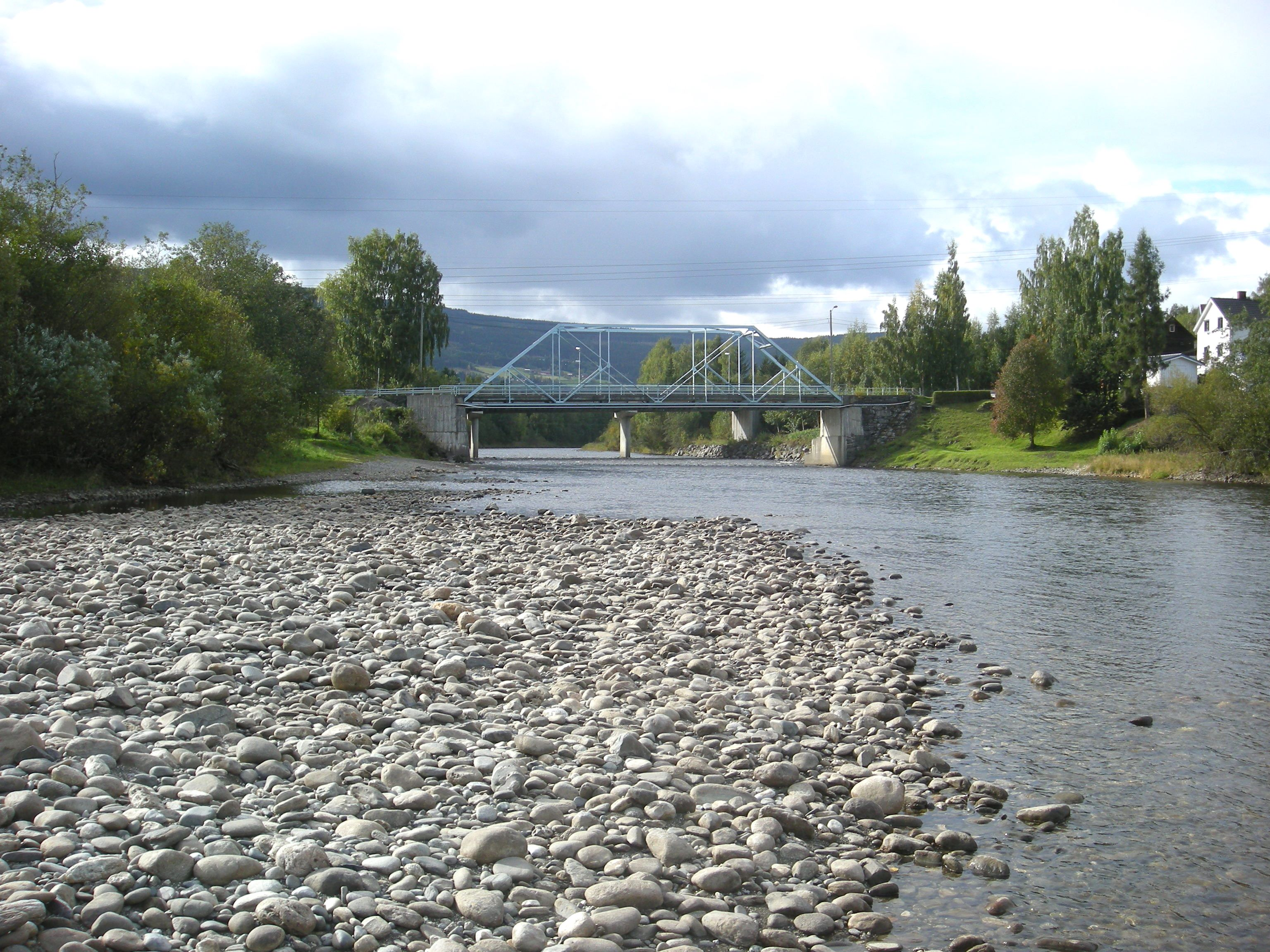 Gausa like før utløpet i Gudbrandsdalslågen. Over broen går fylkesvei 319.